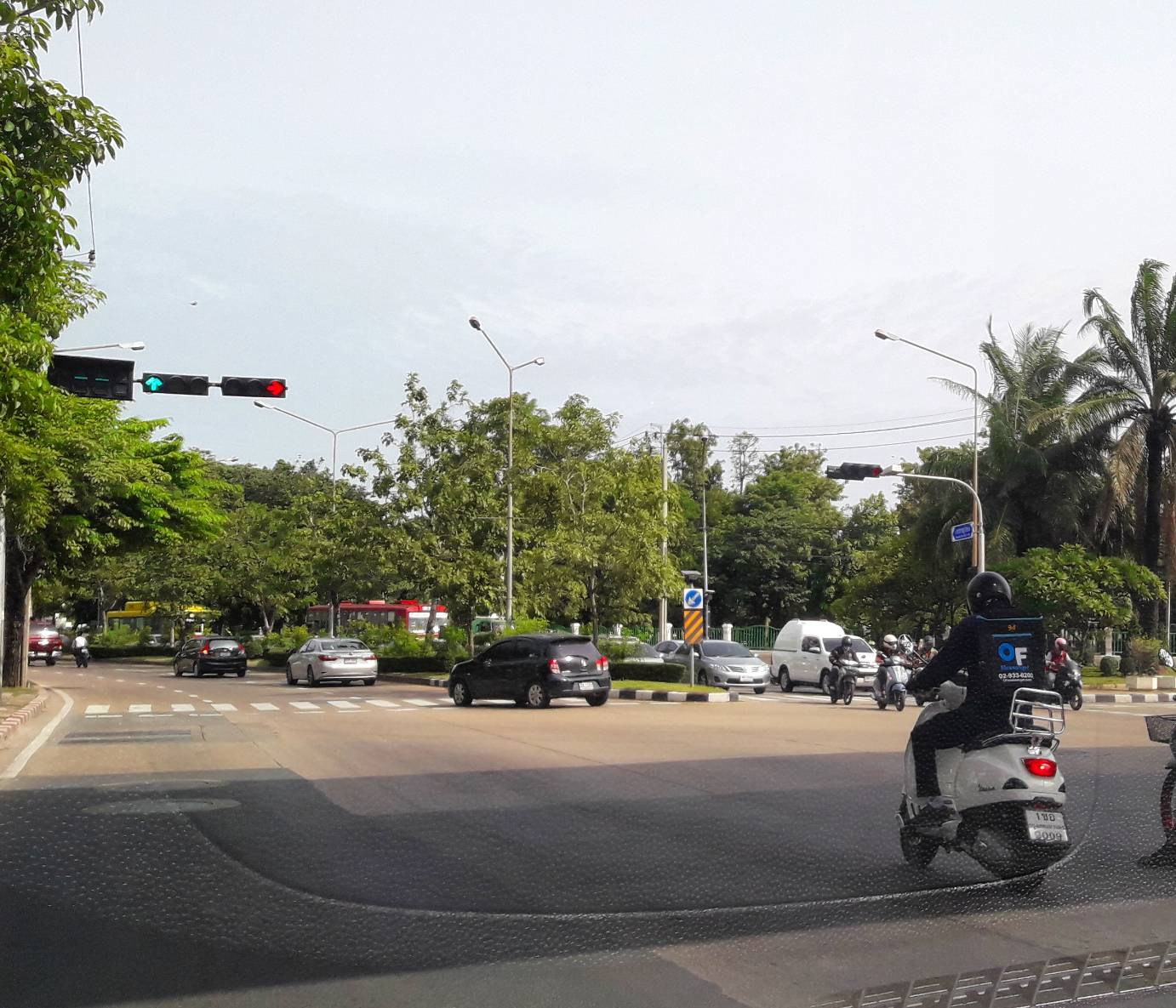 แยกประชาราษฎร์ บริเวณฝั่งถนนประชาราษฎร์สาย 1 มุ่งหน้าแยกพิบูลสงคราม